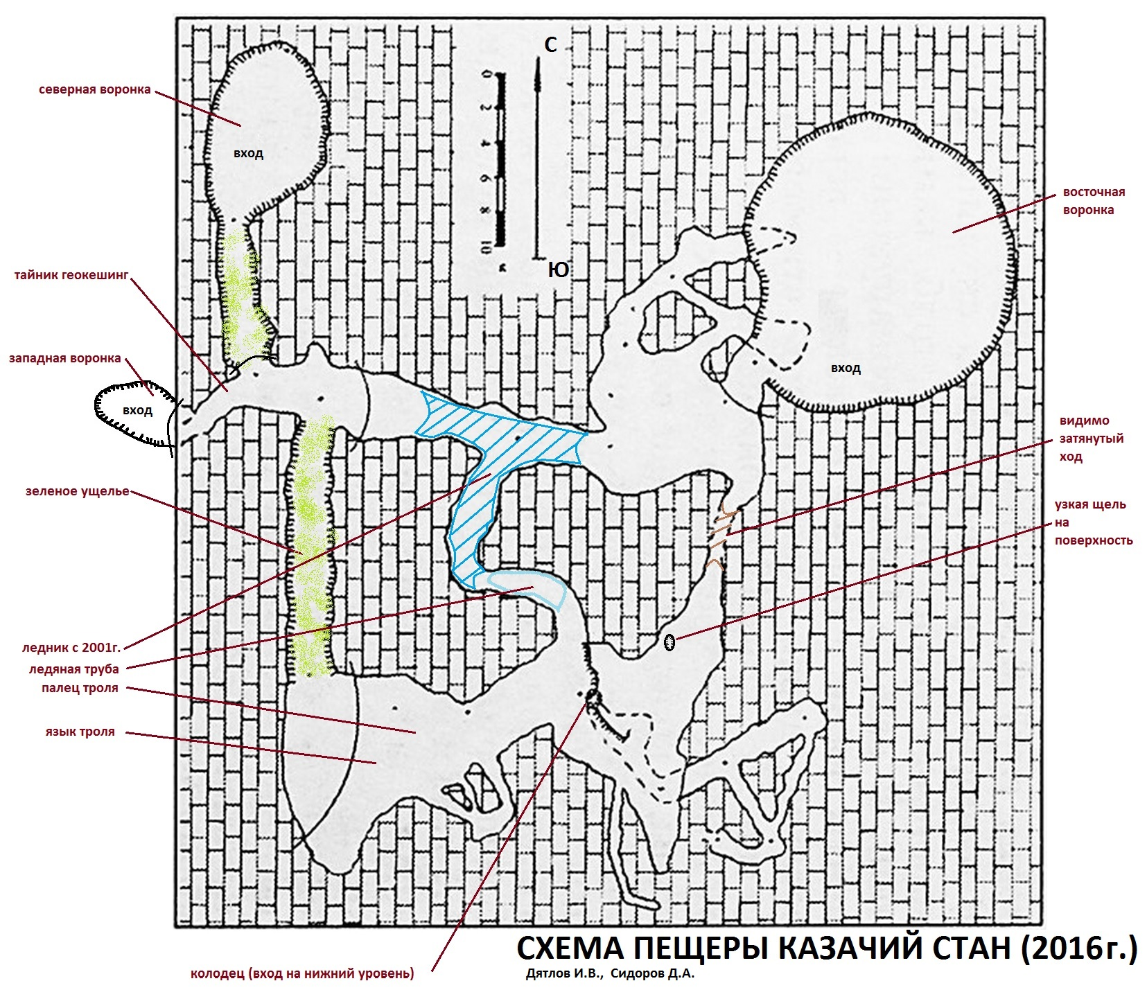 Пещера "Казачий стан". Топографическая карта 1972 год с дополнениями 2016 года